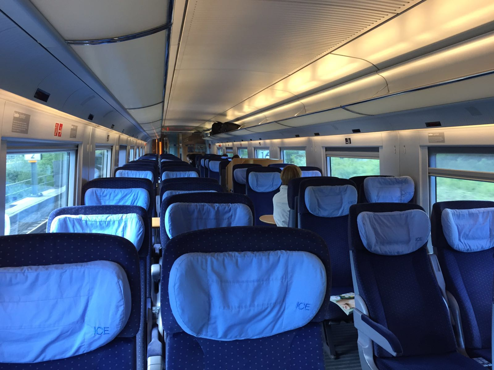 ICE - Blick im Großraumwagen